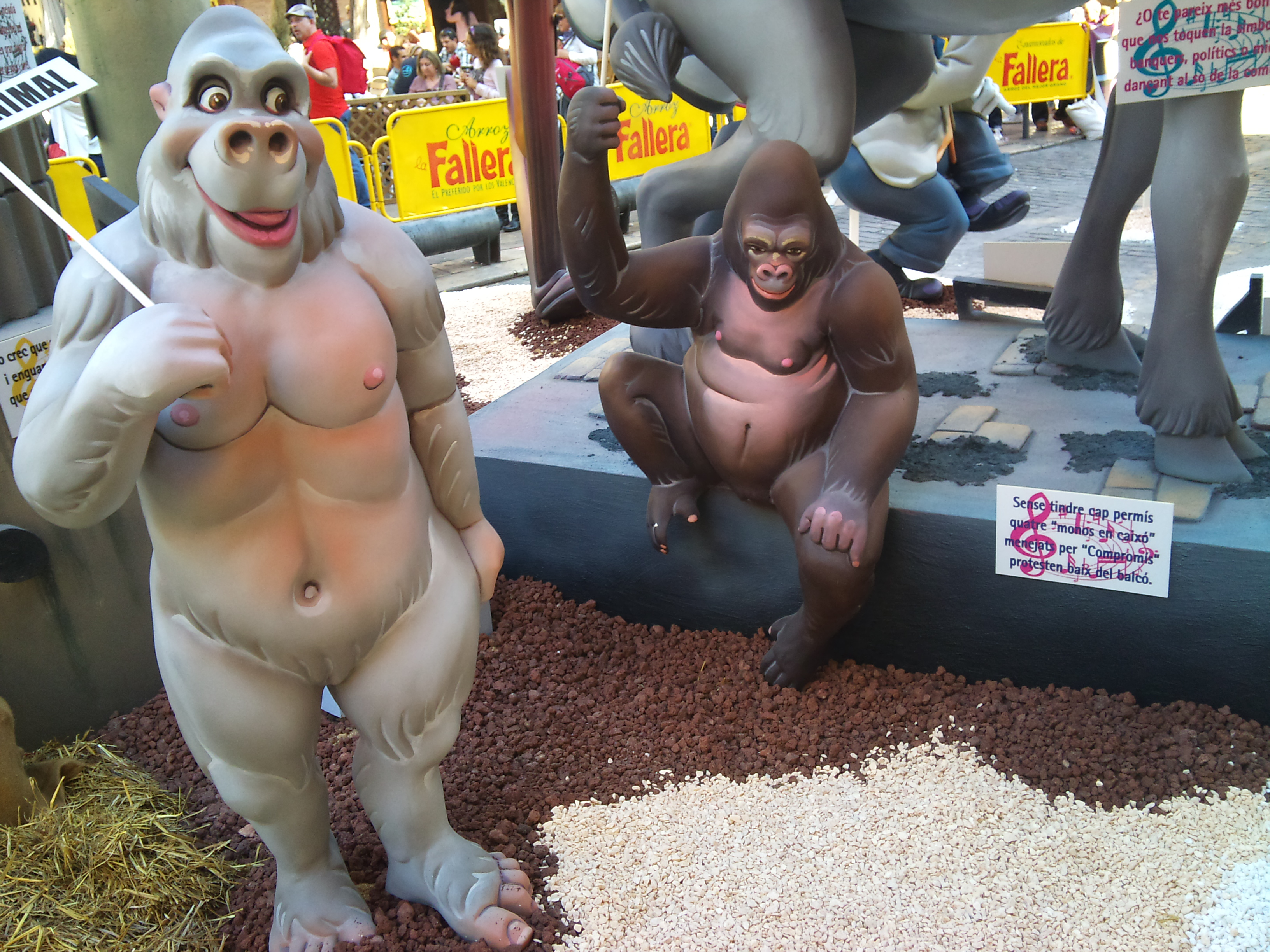 Ninot sobre la "intifalla" a Bolseria-Tros Alt, 2012